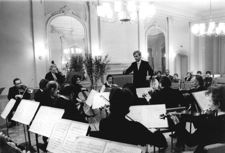 Tützpatz, Konzert ADN-ZB Bartocha 12.3.85 Bez. Neubrandenburg: Beim Konzertwinter auf dem Lande gastierte die Neubrandenburger Philharmonie in kleiner Besetzung u.a. in Tützpatz, Kreis Altentreptow. Der Spiegelsaal im ehemaligen Schloß des Ortes zählt zu den schönsten Sälen im Bezirk. Auf dem Programm standen Sonaten und Lieder von Bach, Händel, Telemann, Albert und Rathgeber. Rudolf Nötzel dirigierte das Orchester.